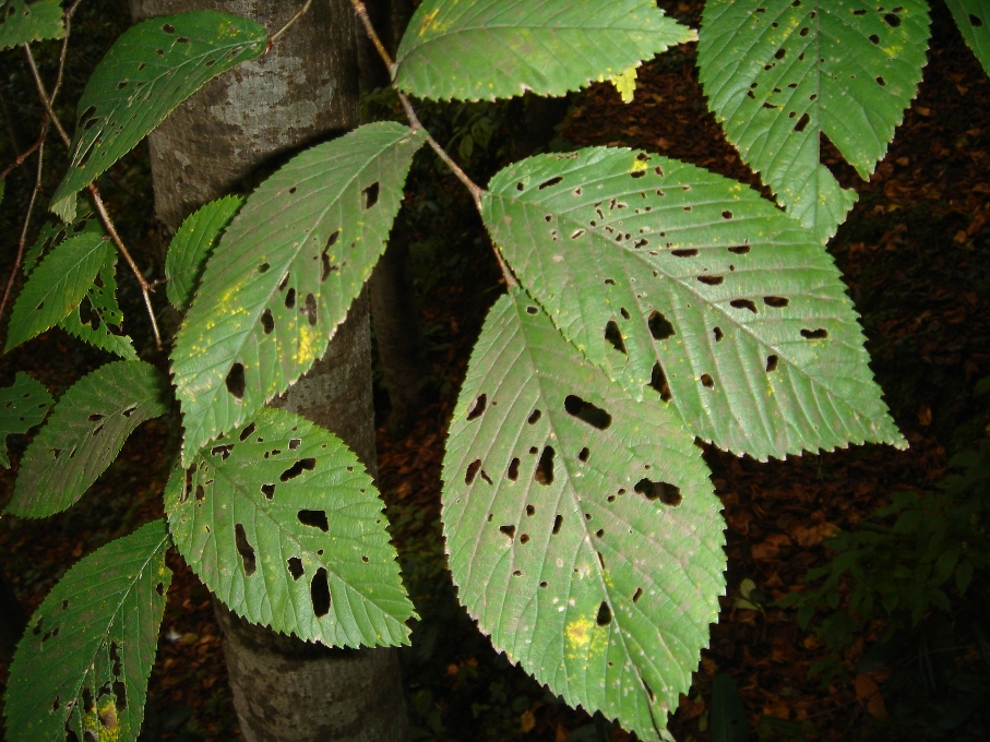 Ulmus glabra